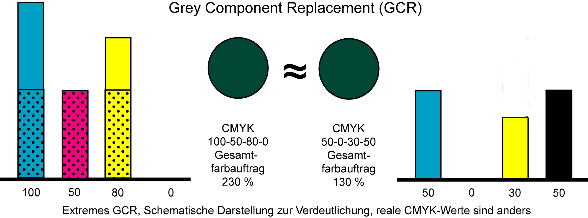 GCR Schema